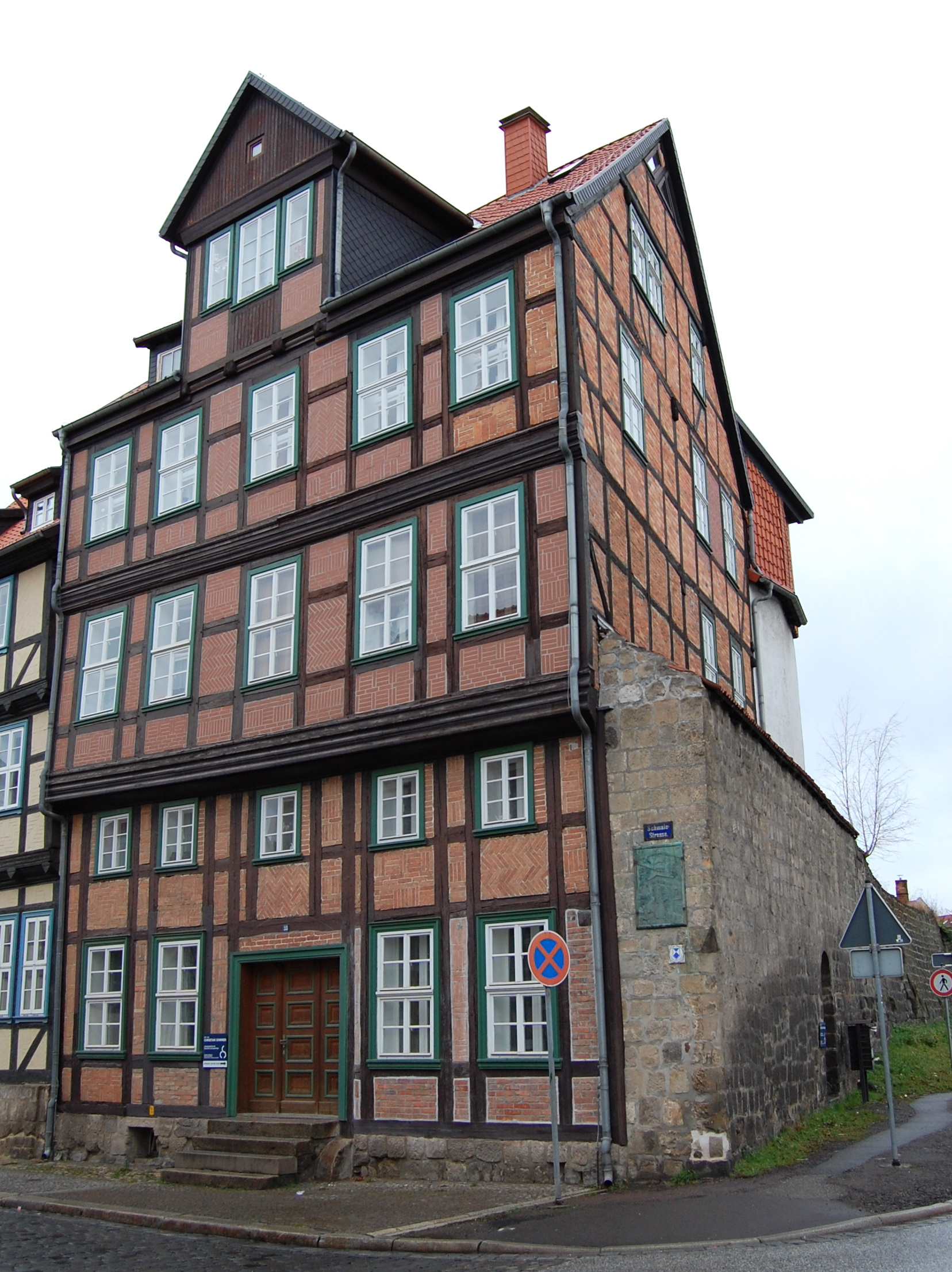 Haus Schmale Straße 33 in Quedlinburg, direkt an der Stadtmauer gebaut. Früher befand sich hier eines der Stadttore. Nach rechts weggehend die Donndorfstraße